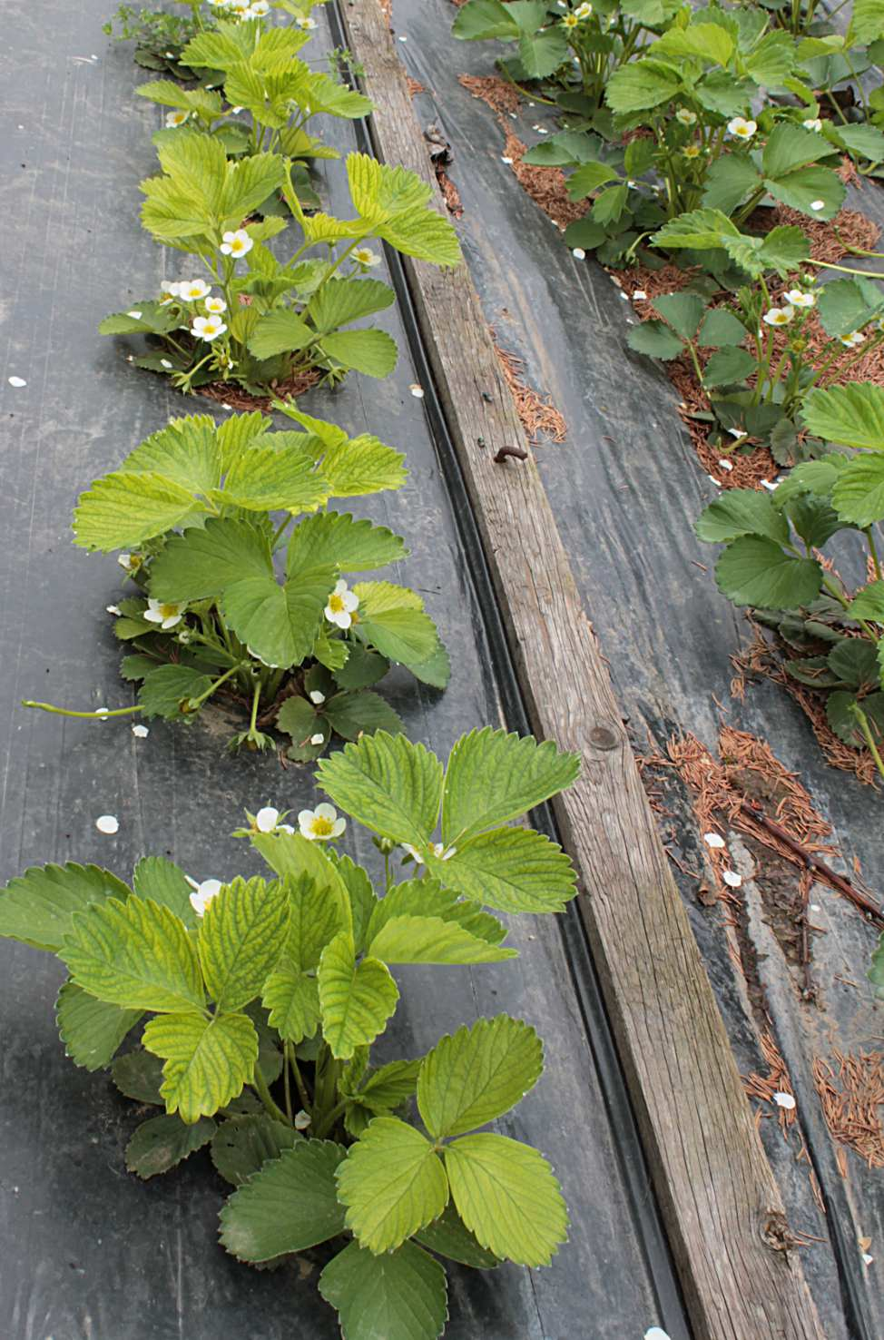 Fragaria × ananassa kalcióza, Popovice u Brna, jahodník, jaro 2013